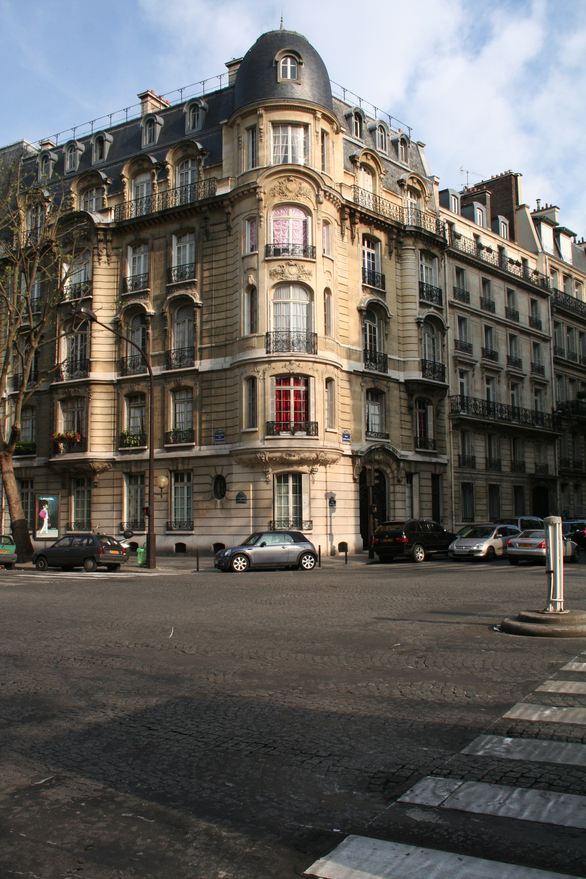 Boulevard Courcelles, Paris VIII.